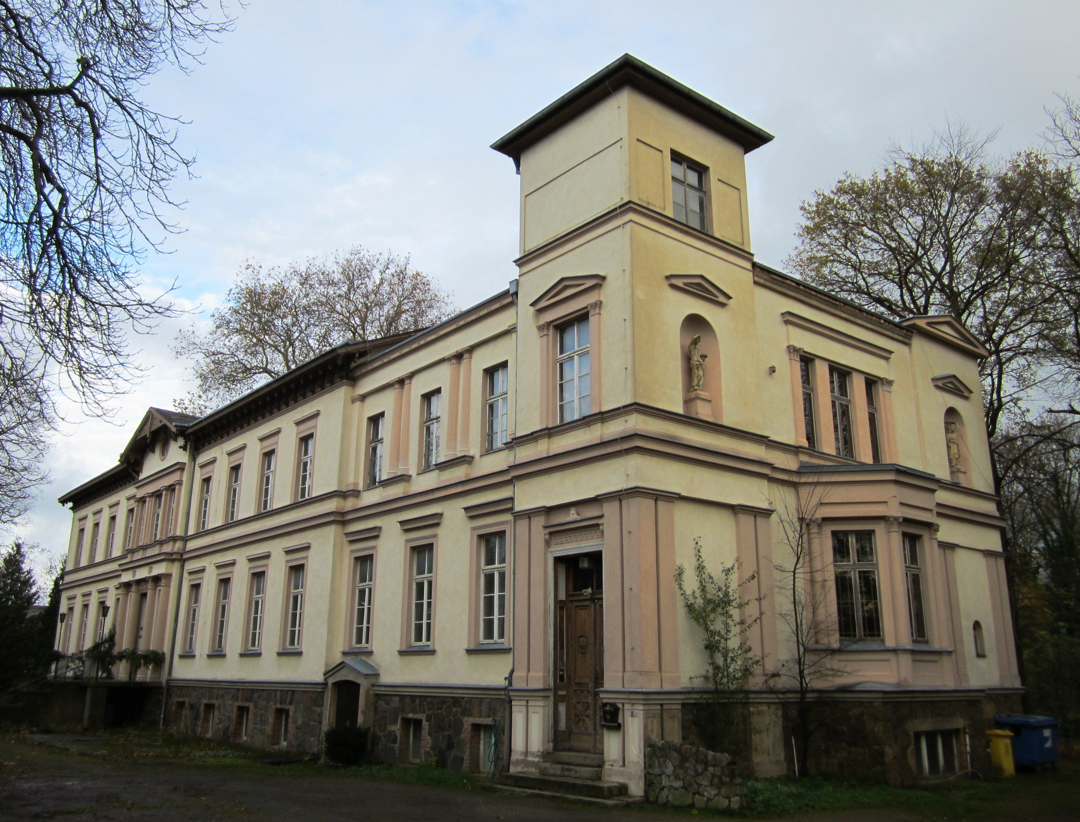 denkmalgeschütztes Gutshaus in Booßen